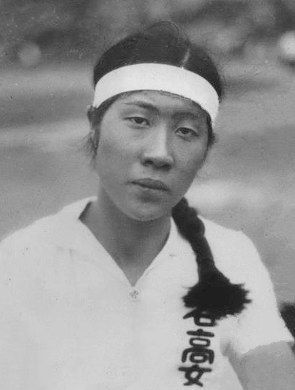 Sumiko Watanabe Press Photo